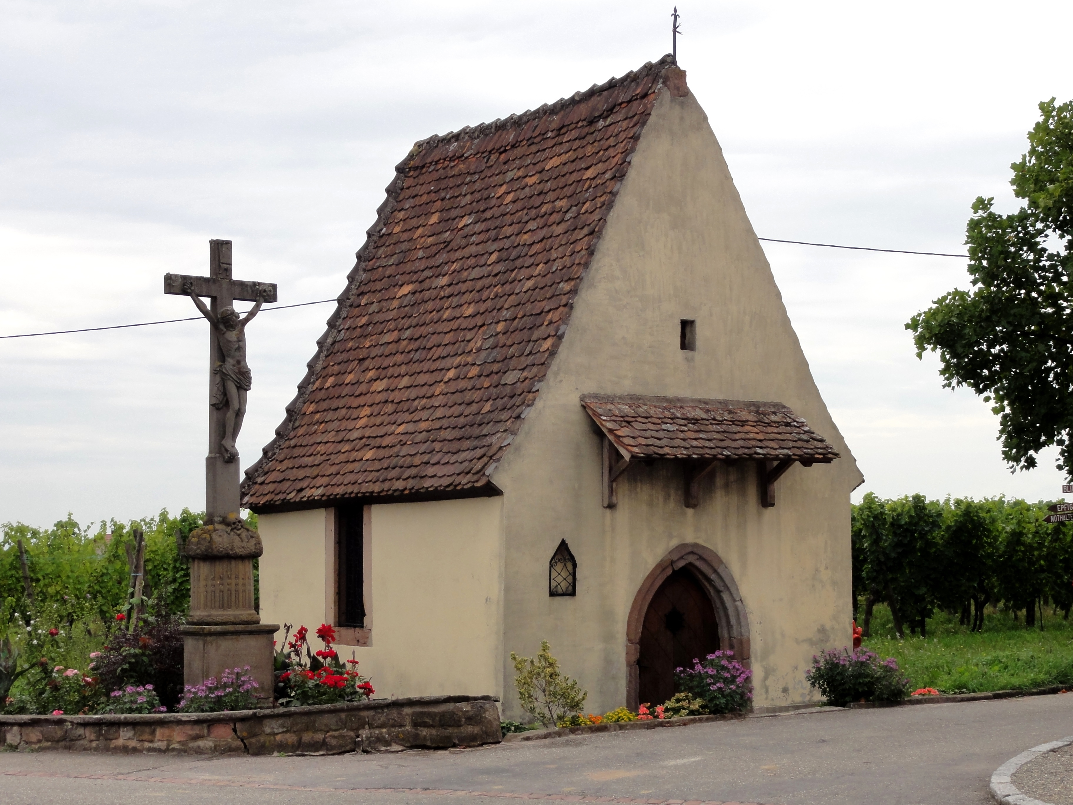 Alsace, Bas-Rhin, Blienschwiller, Chapelle Saint-Érasme (XIIe-XVe siècle): .